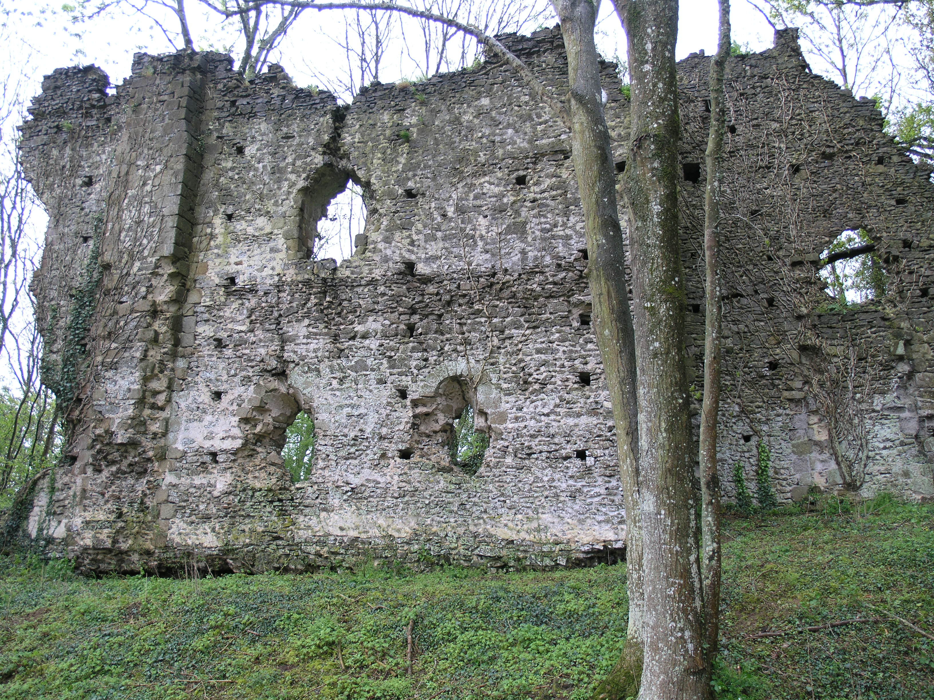 Ruines du château de Courtaliéru (Vimarcé) en 2008